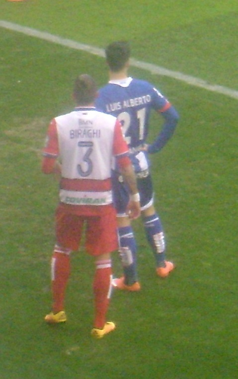 Biraghi.